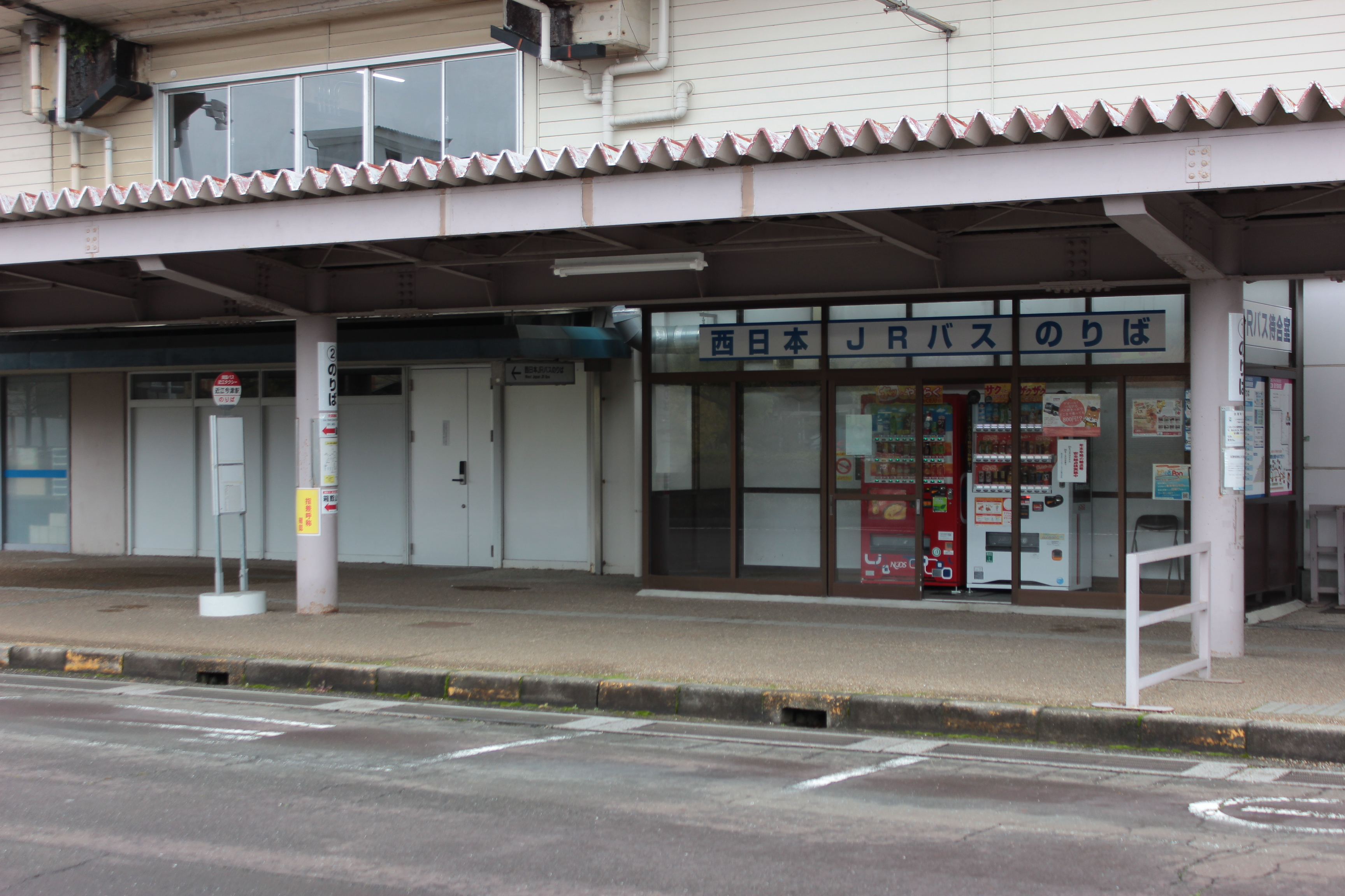 近江今津駅のバス乗り場 Canon EOS Kiss X5